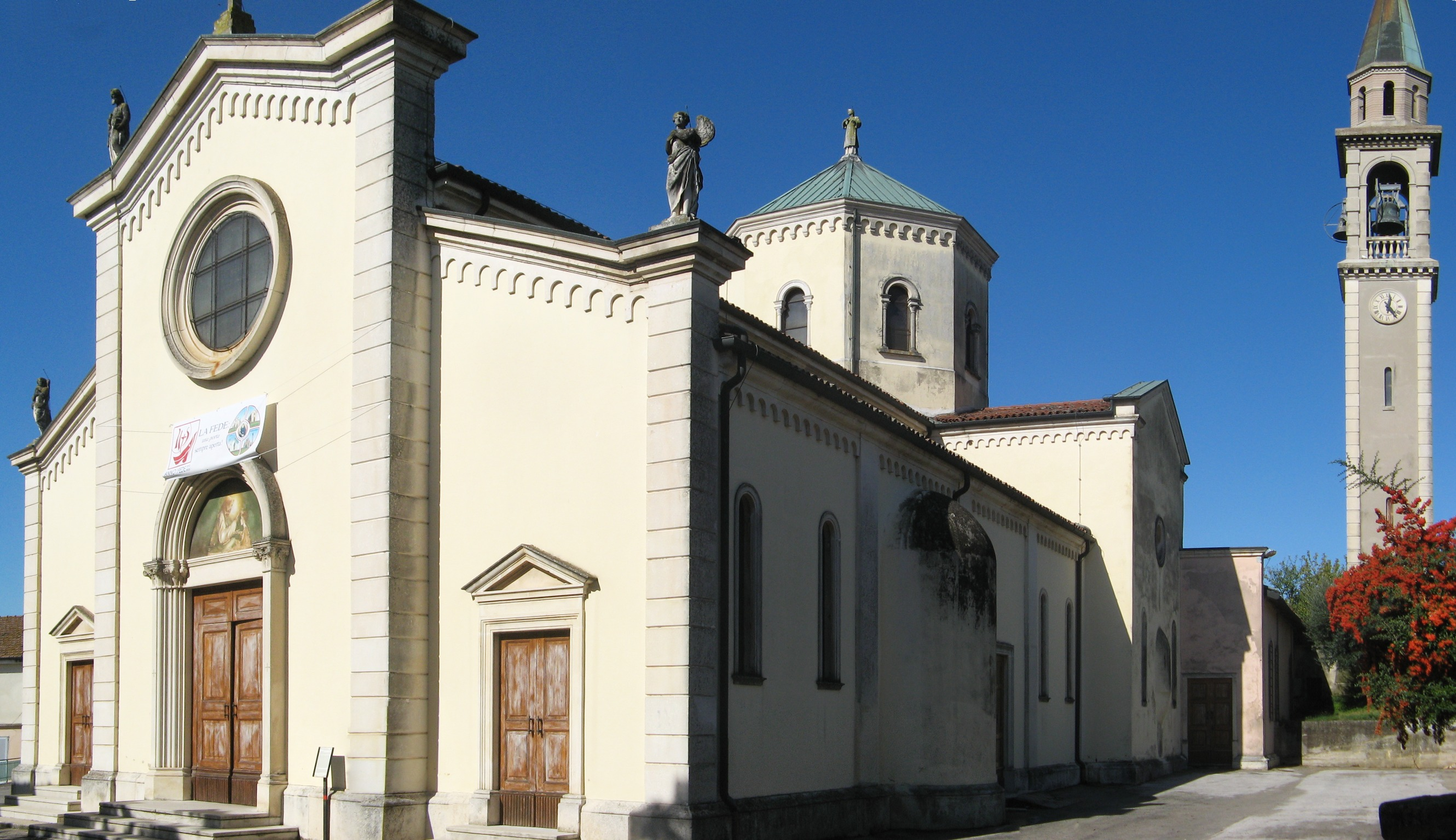 Chiesa di S. Stefano e campanile, XX secolo, sede parrocchiale della frazione di Vo', Brendola (VI)